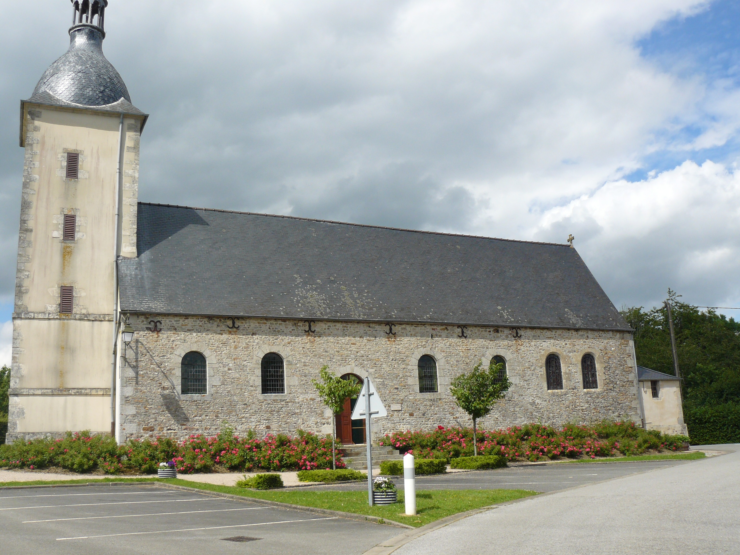 Église à Le Cercueil (Orne).